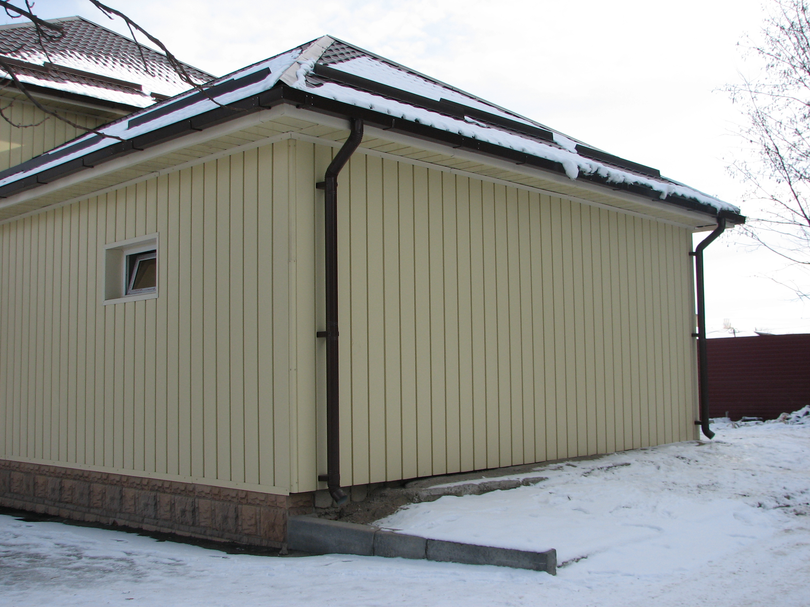 линераные панели и водосточная система Металл Профиль